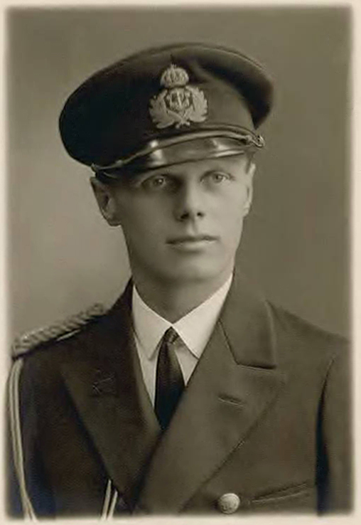 Pedro Ahlmark, svensk kommendörkapten.